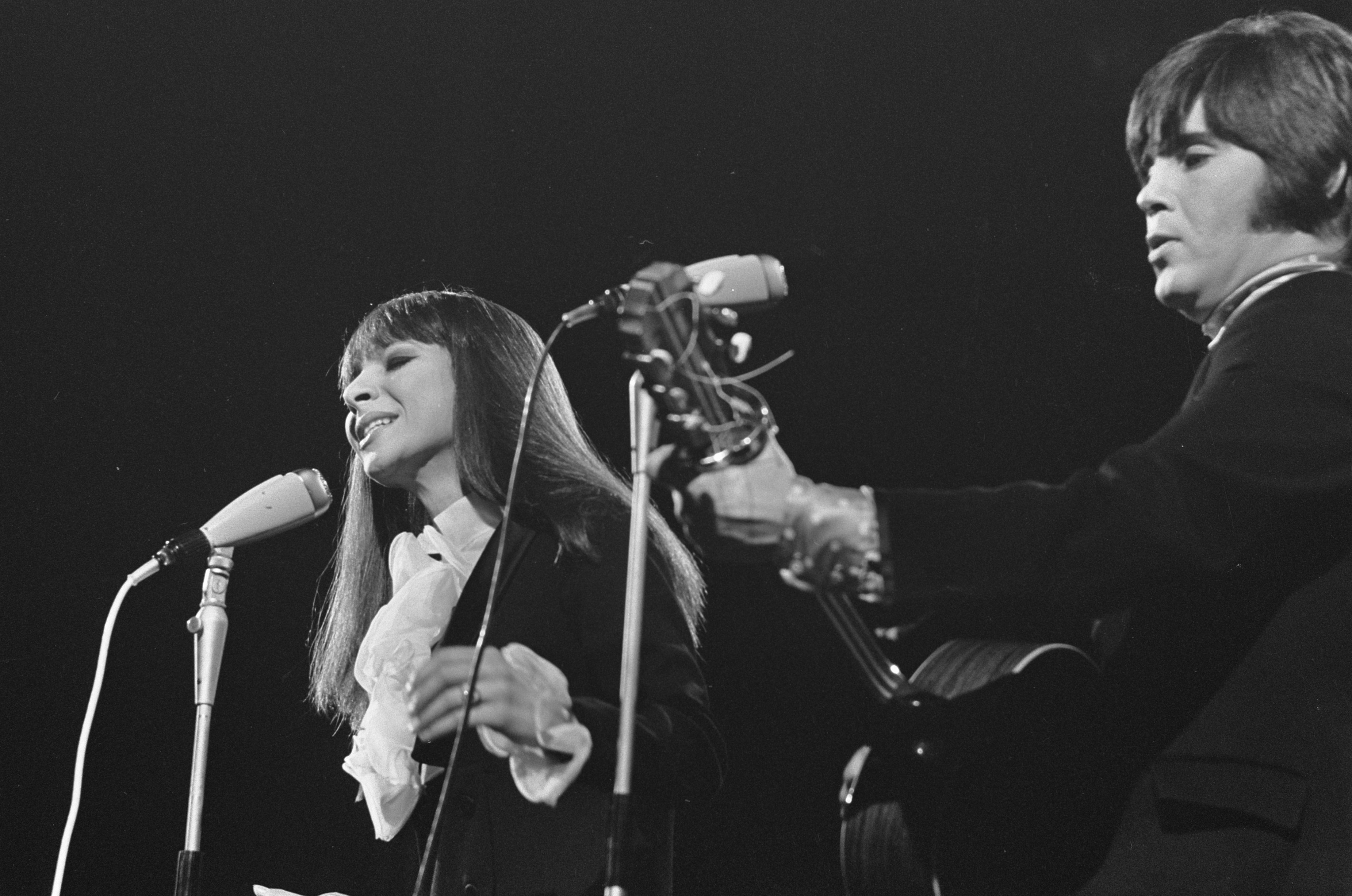 Collectie / Archief : Fotocollectie Anefo Reportage / Serie : Grand Gala du Disque 1968 Beschrijving : Grand Gala du Disque . Esther en Abraham Ofarim Datum : 8 maart 1968 Locatie : Amsterdam Trefwoorden : zangers Persoonsnaam : Ofarim, Abi, Ofarim, Esther Fotograaf : Kroon, Ron / Anefo Auteursrechthebbende : Nationaal Archief Materiaalsoort : Negatief (zwart/wit) Nummer archiefinventaris : bekijk toegang 2.24.01.05 Bestanddeelnummer : 921-1481